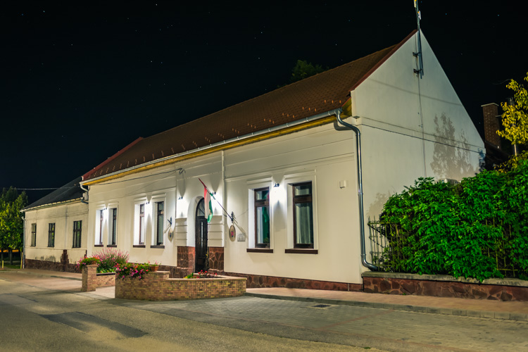 Községháza, Balatonfőkajár, Veszprém megye